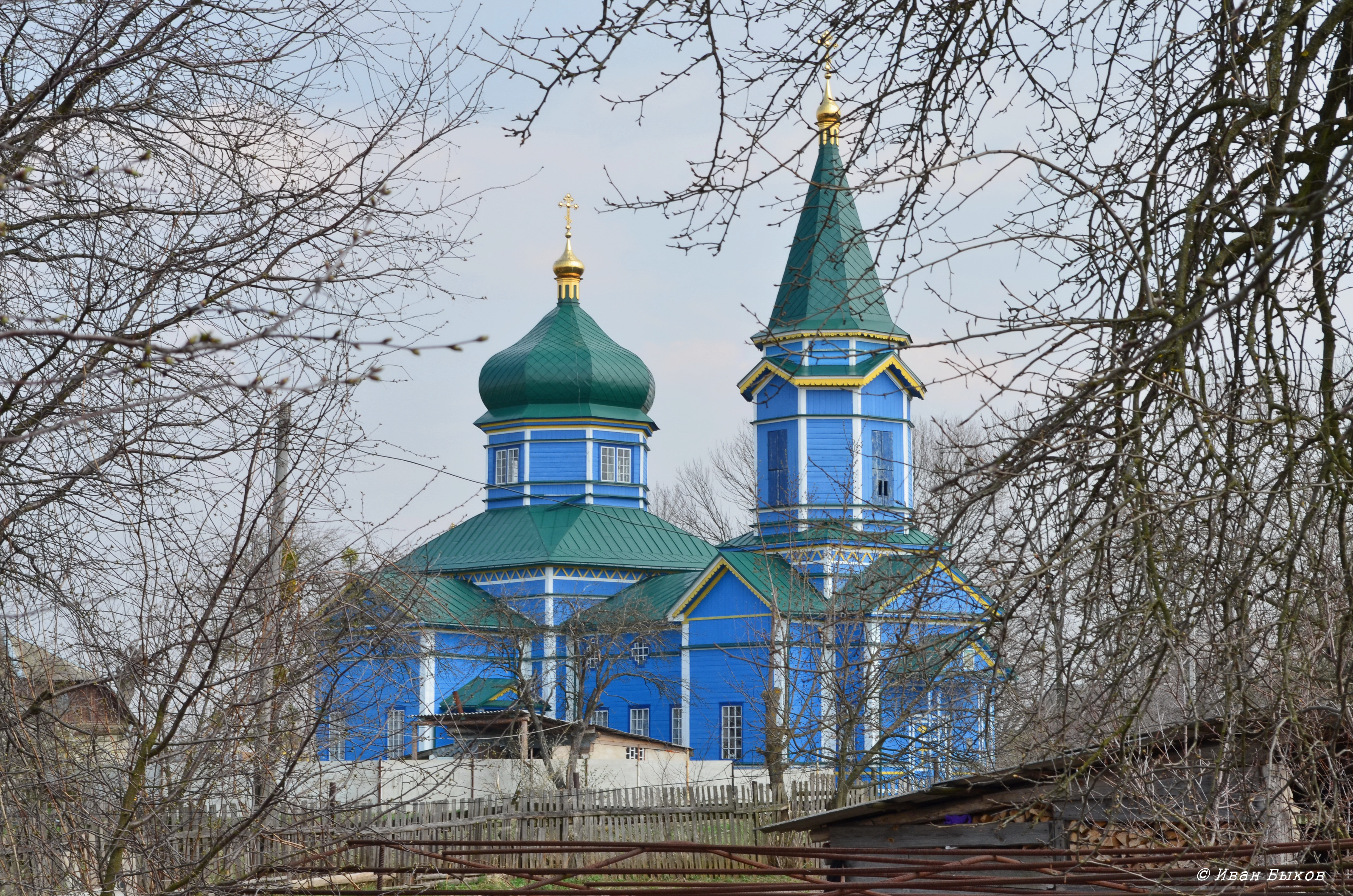 Українка ( Пенязевичі). Дерев'яна Михайлівська церква. 1898 р.